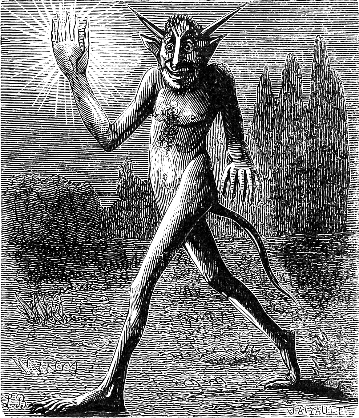 Une illustration pour l’article Yan-gant-y-tan dans le Dictionnaire infernal par Collin de Plancy.